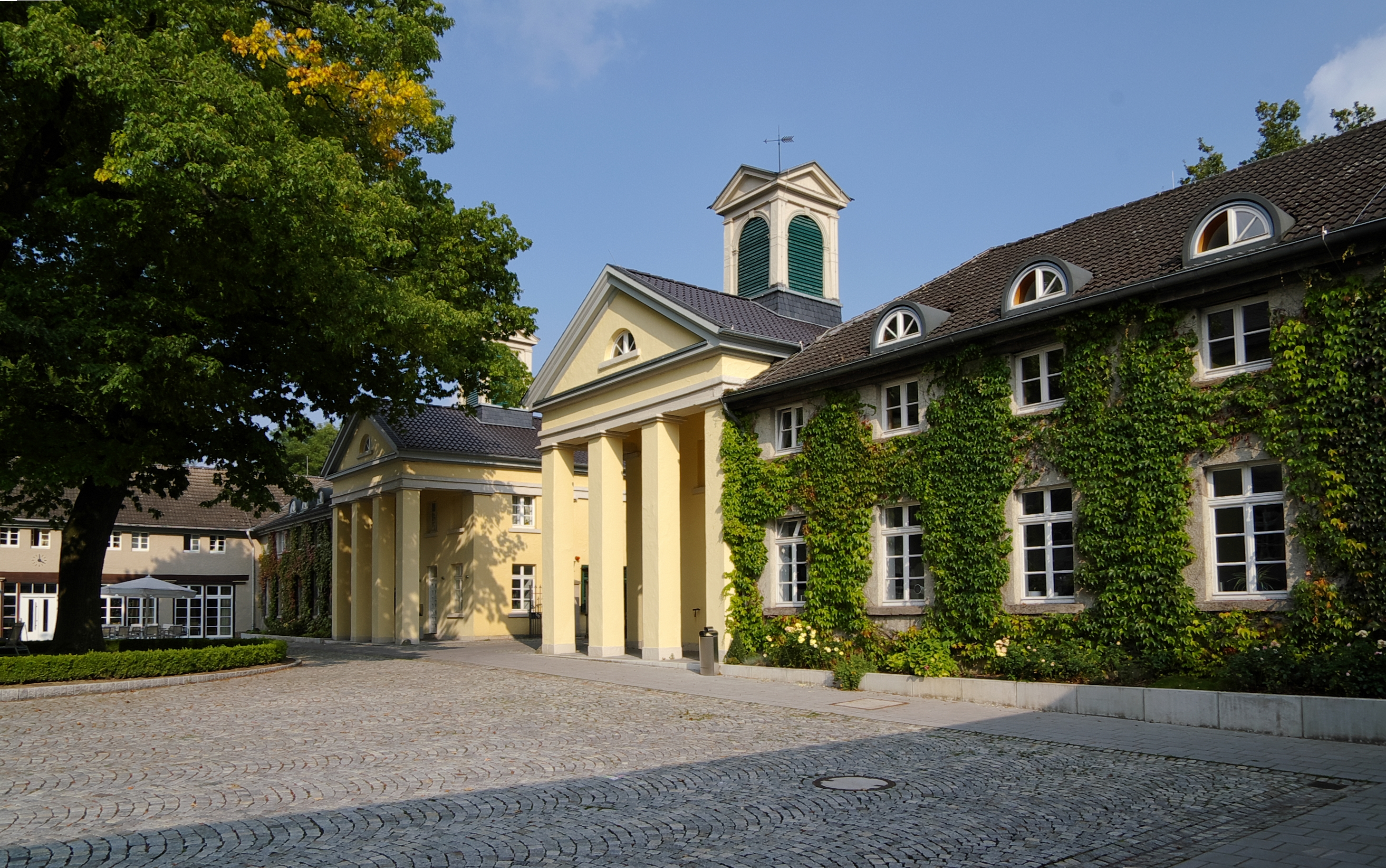 Haus Villigst, evangelische Akademie bei Schwerte-Villigst an der Ruhr.